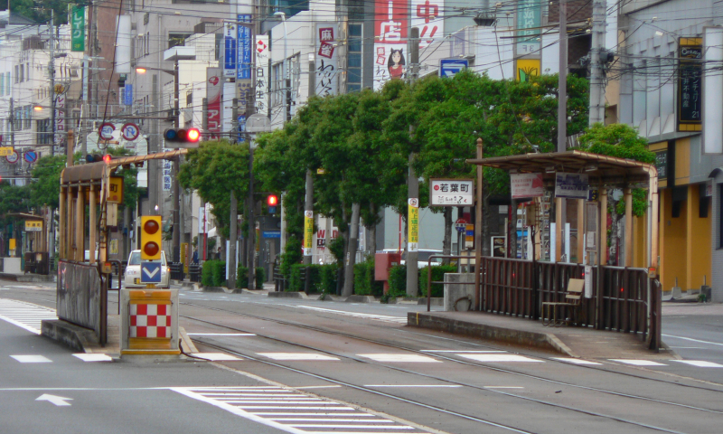 長崎電気軌道、若葉町電停